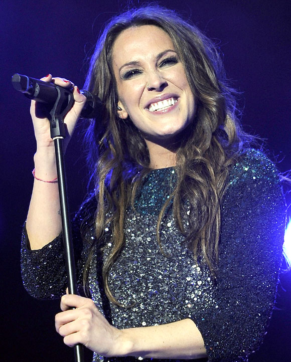 Malú durante el concierto de cadena 100